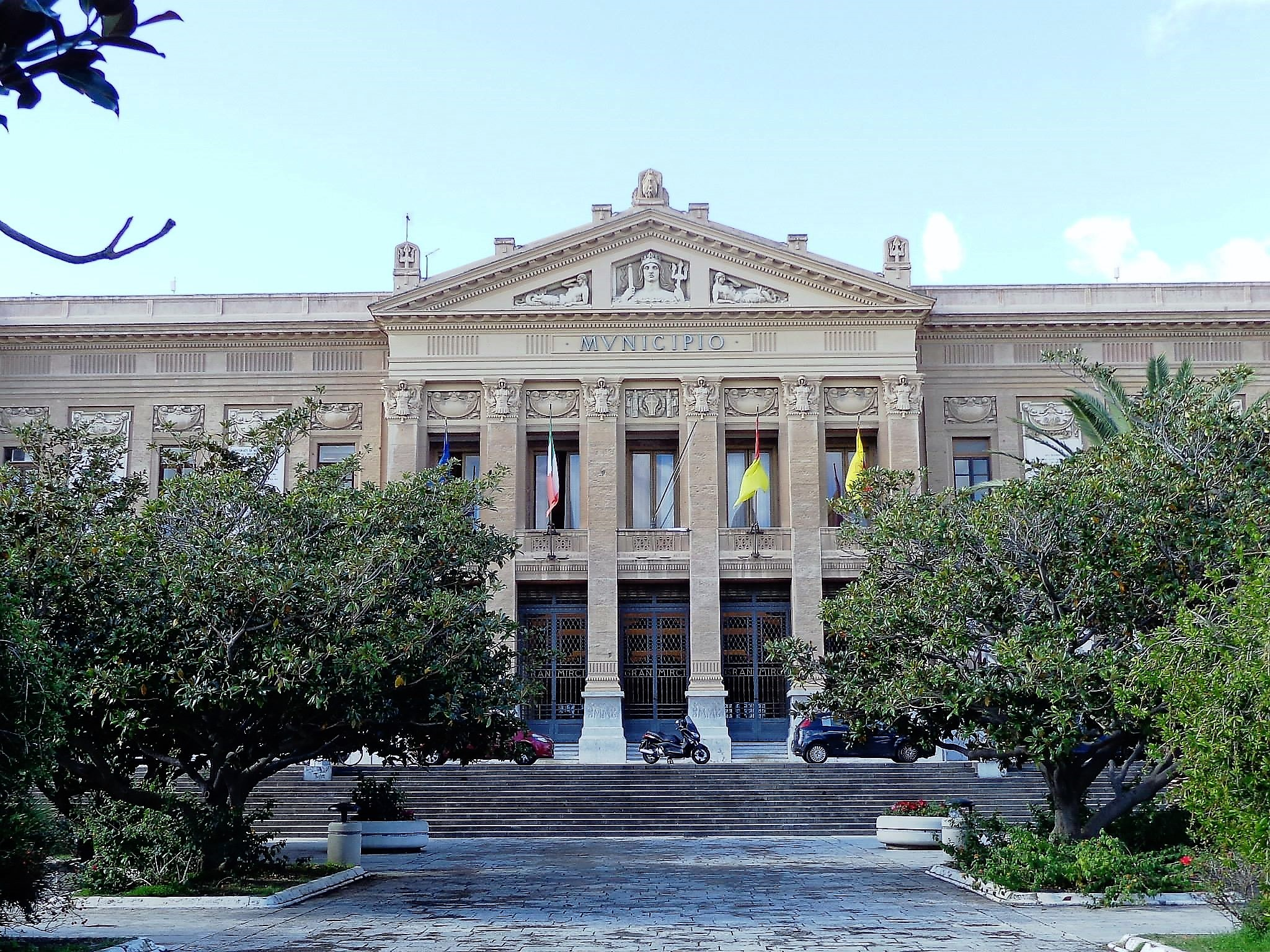 Municipio